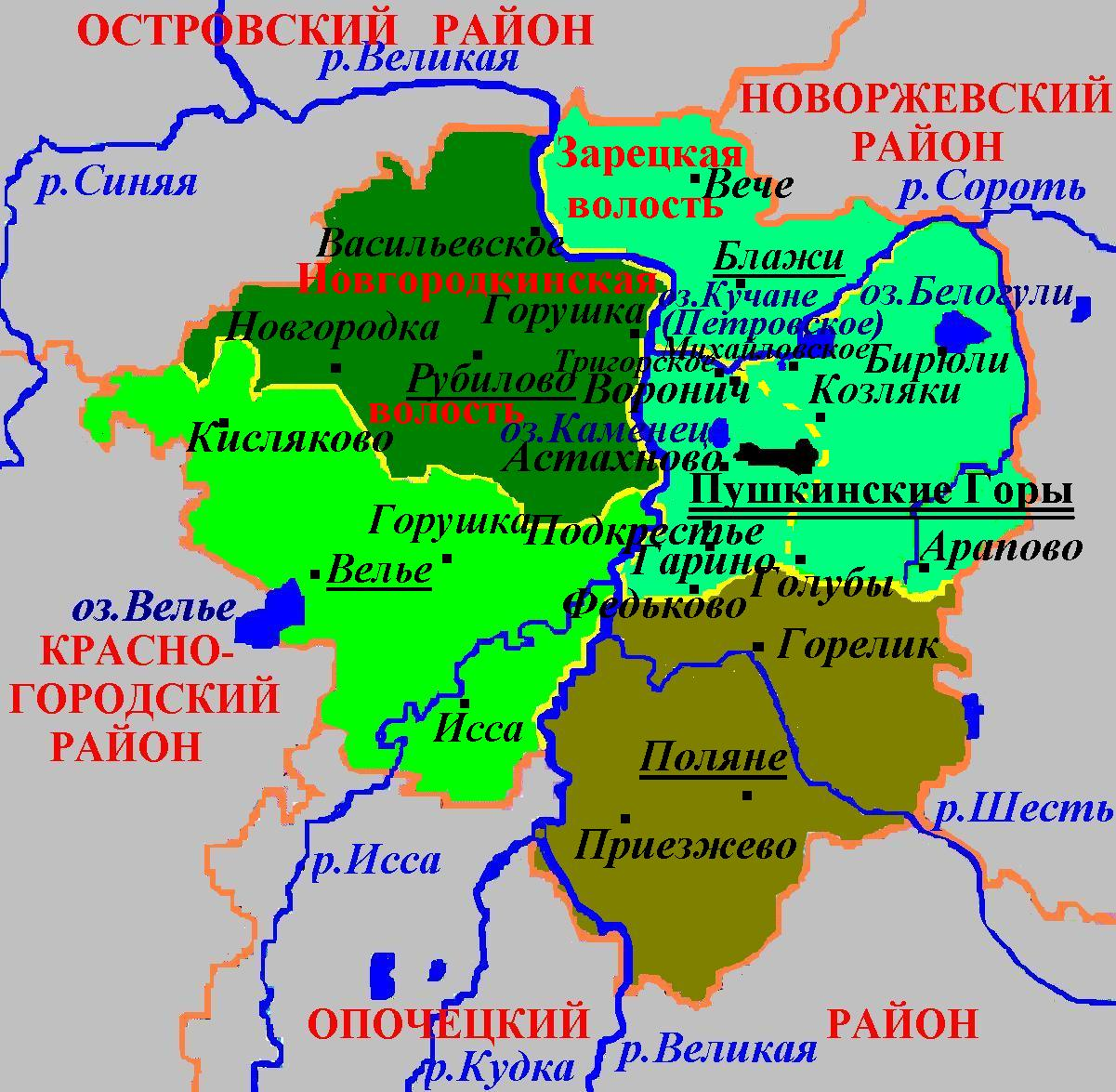 Администартивное деление Пушкиногорского района